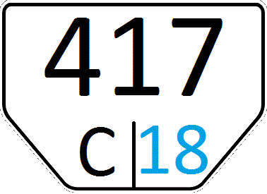 Номерной знак автомобильных прицепов и полуприцепов Узбекистана, стандарт 1996 года